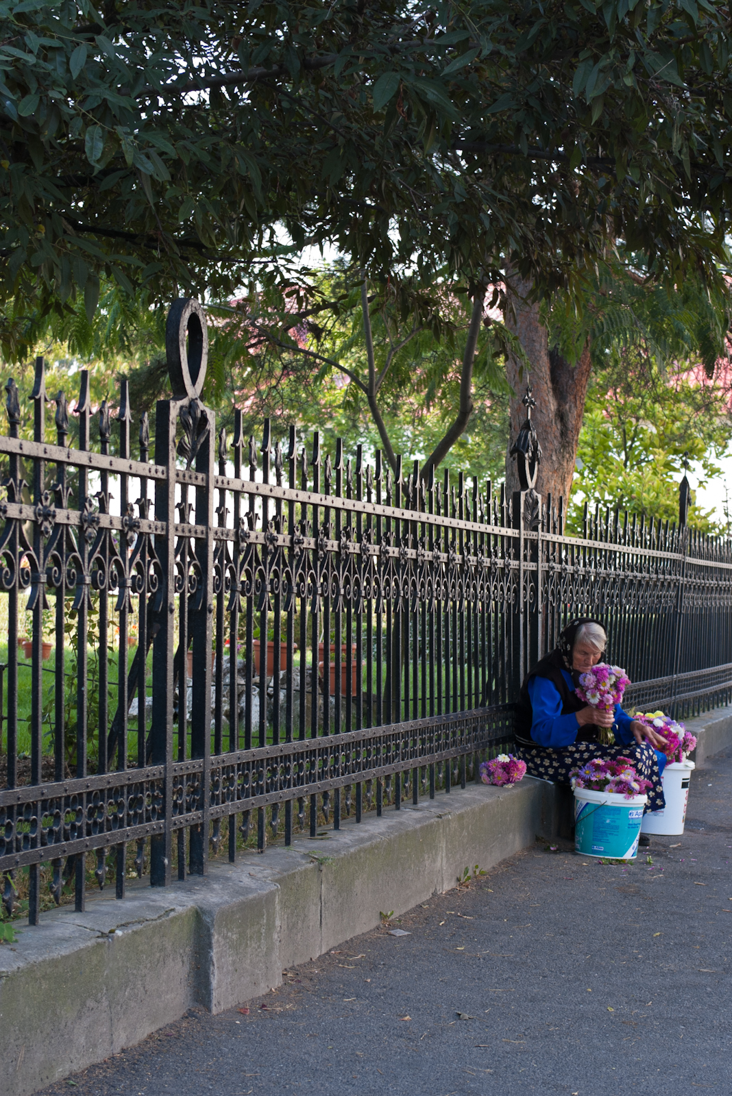 Fotografia prezinta gardul de imprejmuire al ansamblului bisericii "Sf. Vineri". 04